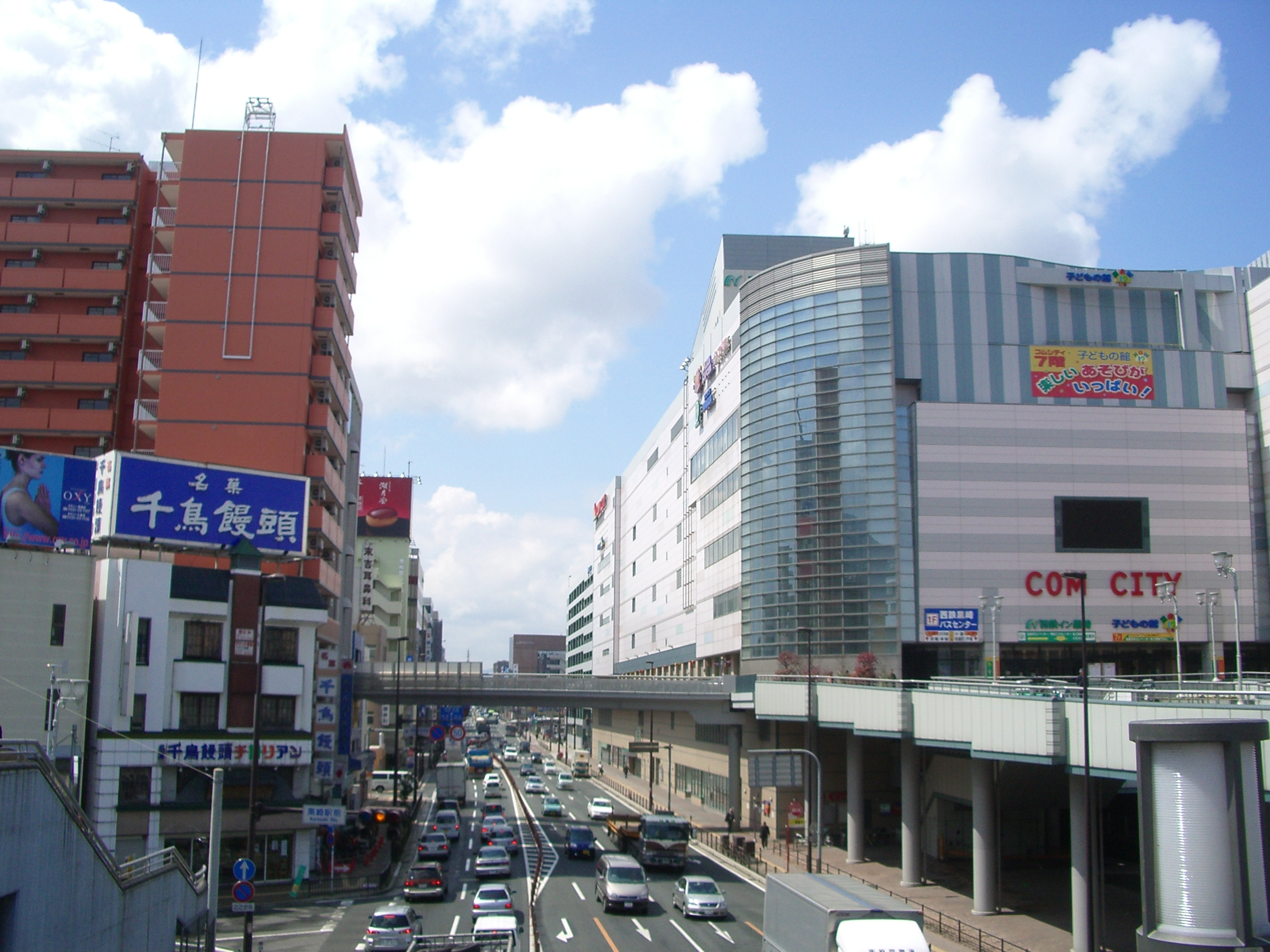 北九州市八幡西区黒崎駅前の写真